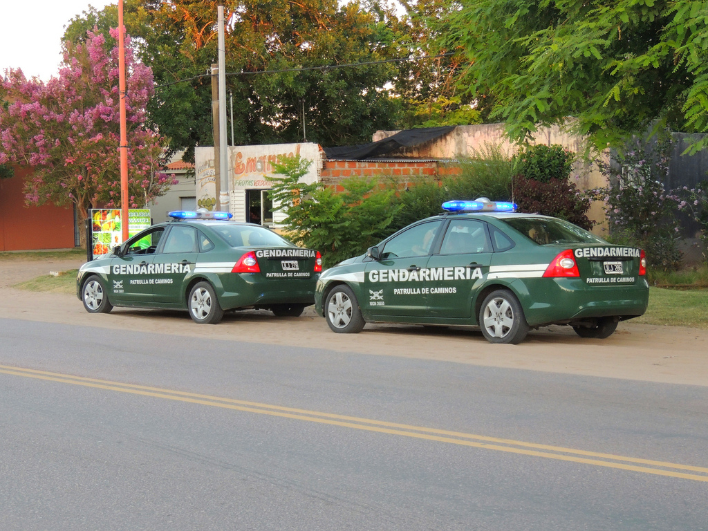 Dos unidades de la Patrulla de Caminos de Gendarmería Nacional Argentina (GNA) al costado de una ruta al norte de la ciudad de Santa Fe